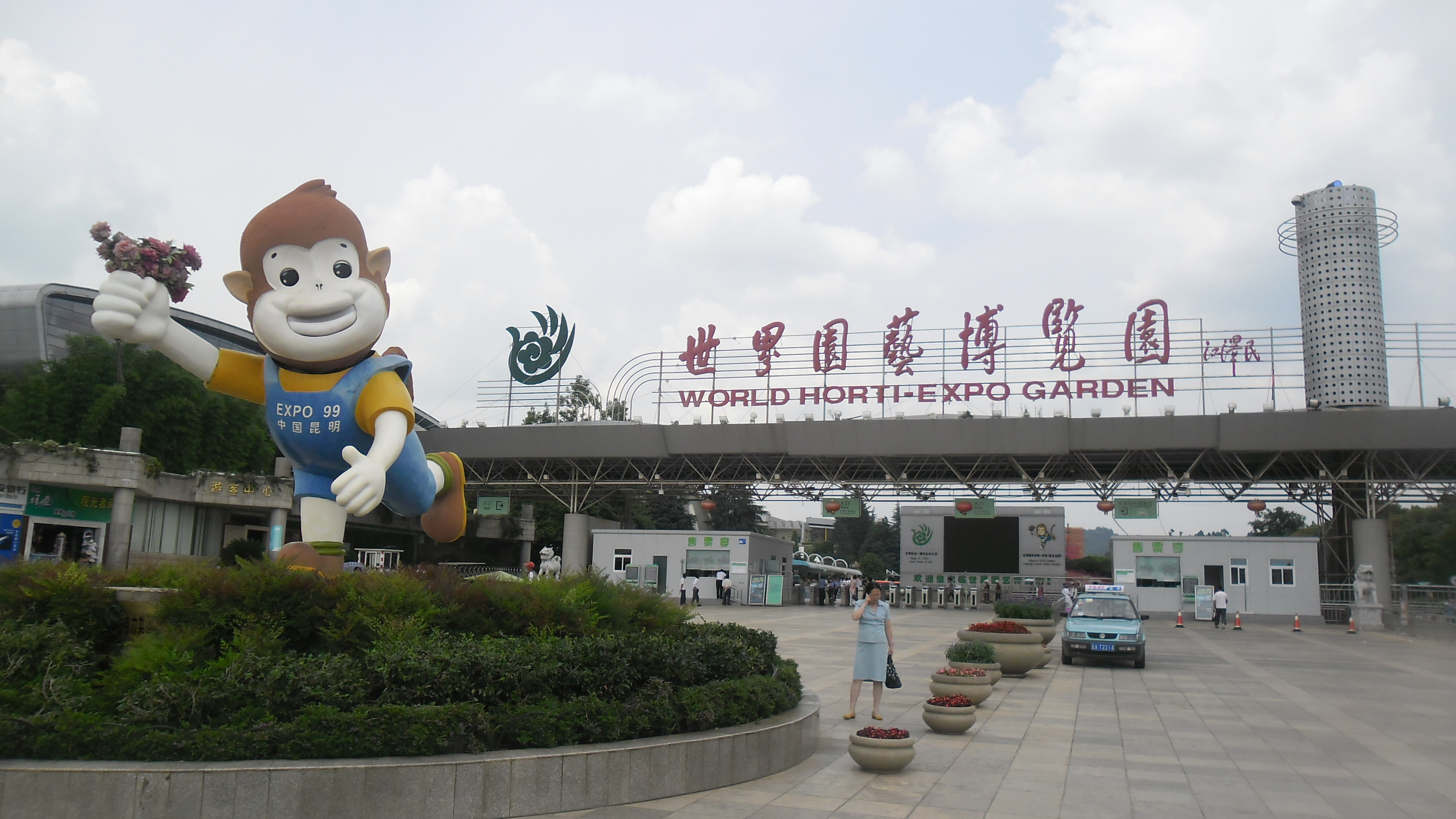 中文（中国大陆）: 昆明世界园艺博览园